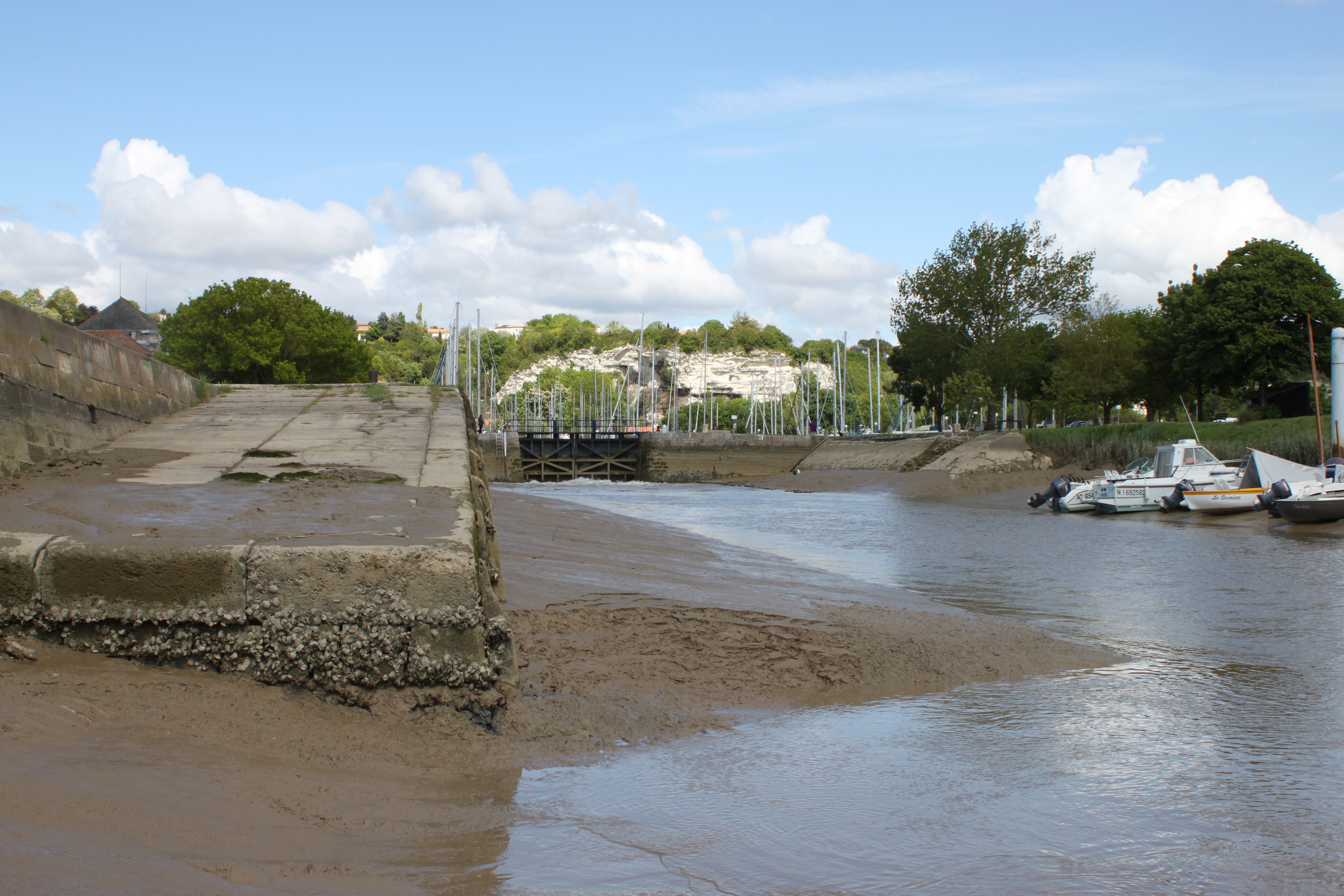 Écluse du bassin à flots, Fr-17-Mortagne-sur-Gironde.